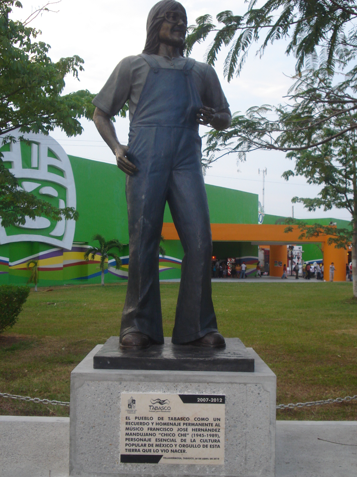 Homenaje permanente al músico Francisco José Hernández Mandujano "Chico Che" (1945-1989). Parque Tabasco en Villahermosa, Tab.